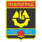 Герб Павлограда радянського періоду